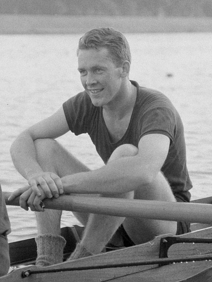 Nationale kampioenschappen roeien op de Bosbaan voor heren twee met stuurman Hartsuiker en D. Vos